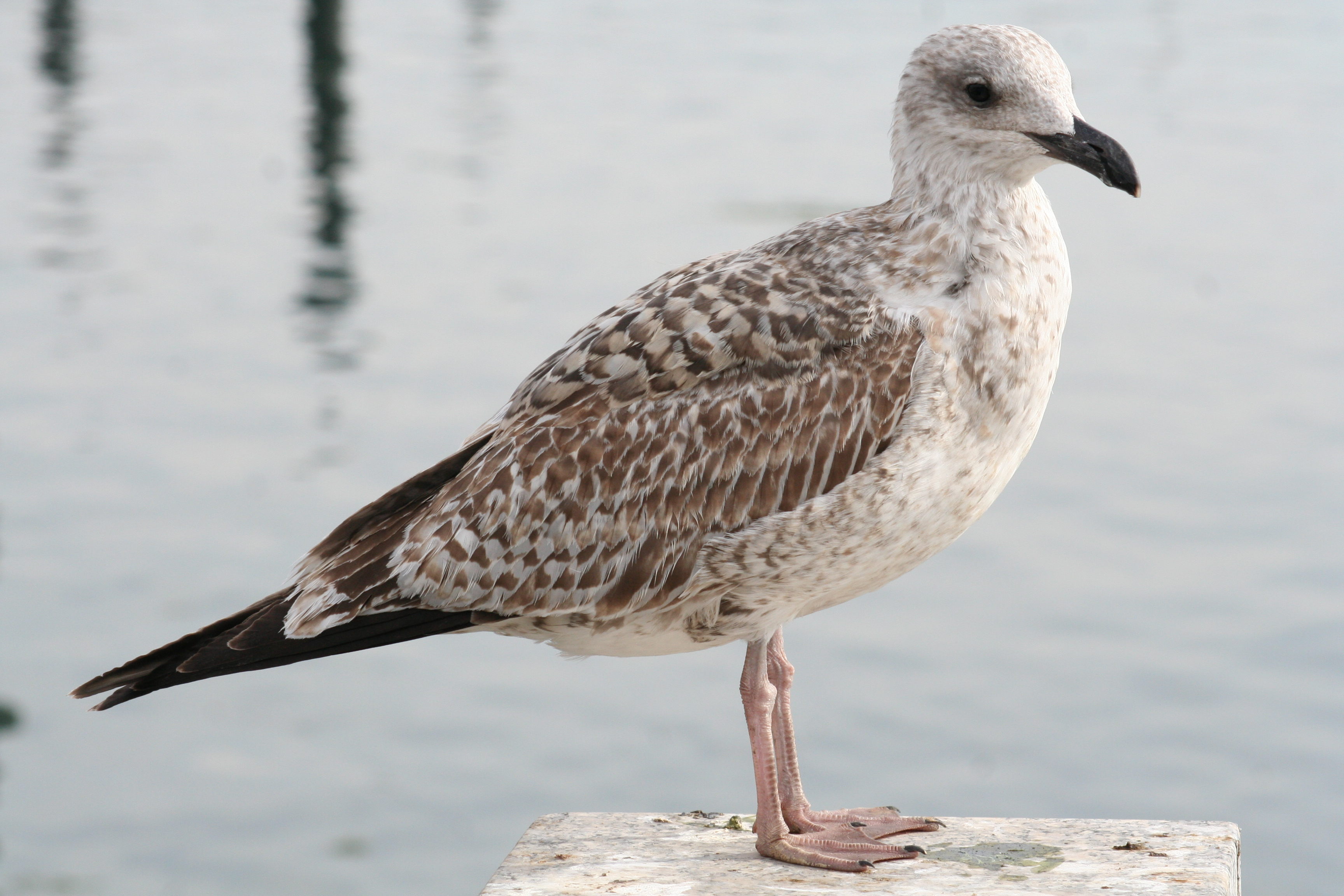 Gaviota patiamarilla (Larus michahellis) con un solo invierno en el puerto marítimo del municipio de Combarro (Pontevedra, España).